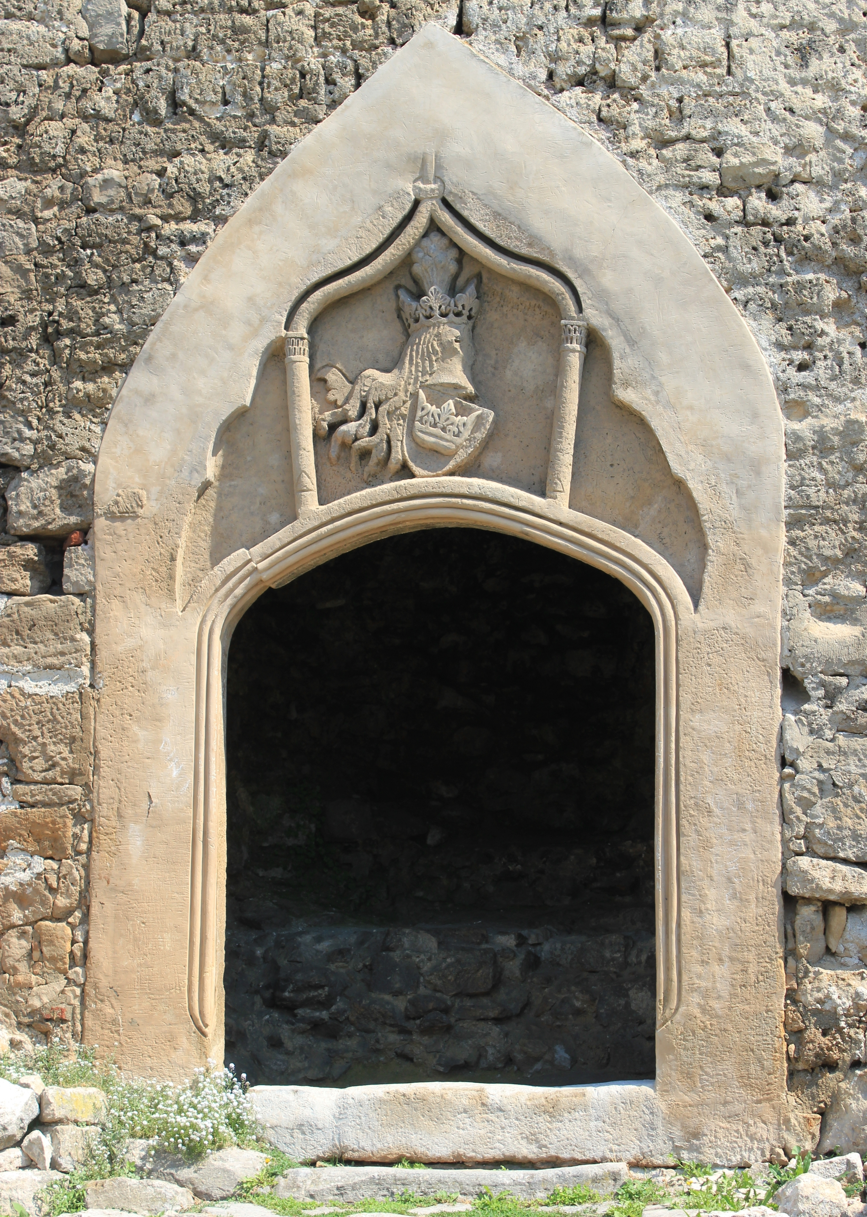 Haupteingang der Festung Jajce